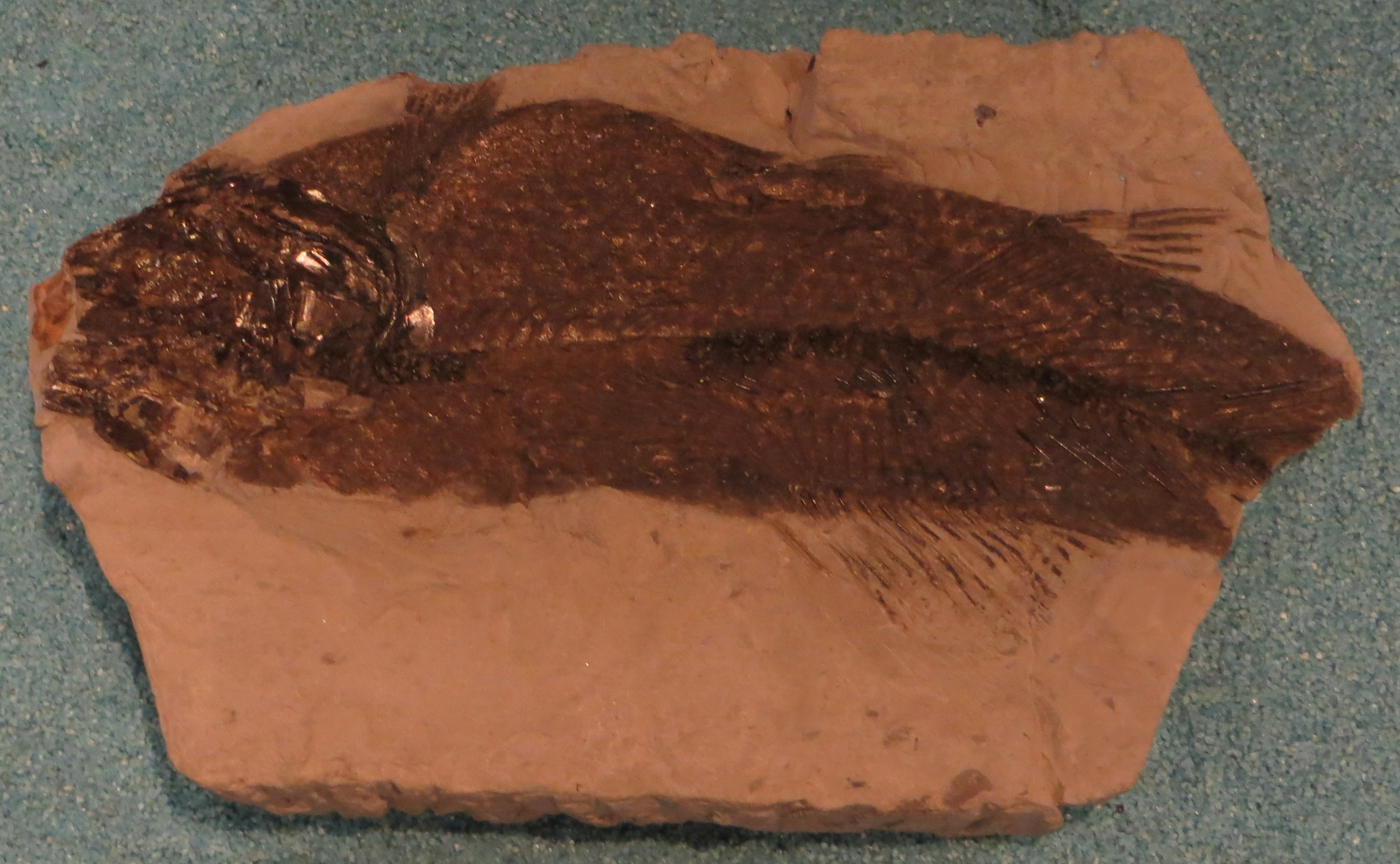 Fossil - Took The picture at Royal Belgian Institute of Natural Sciences, Brussels